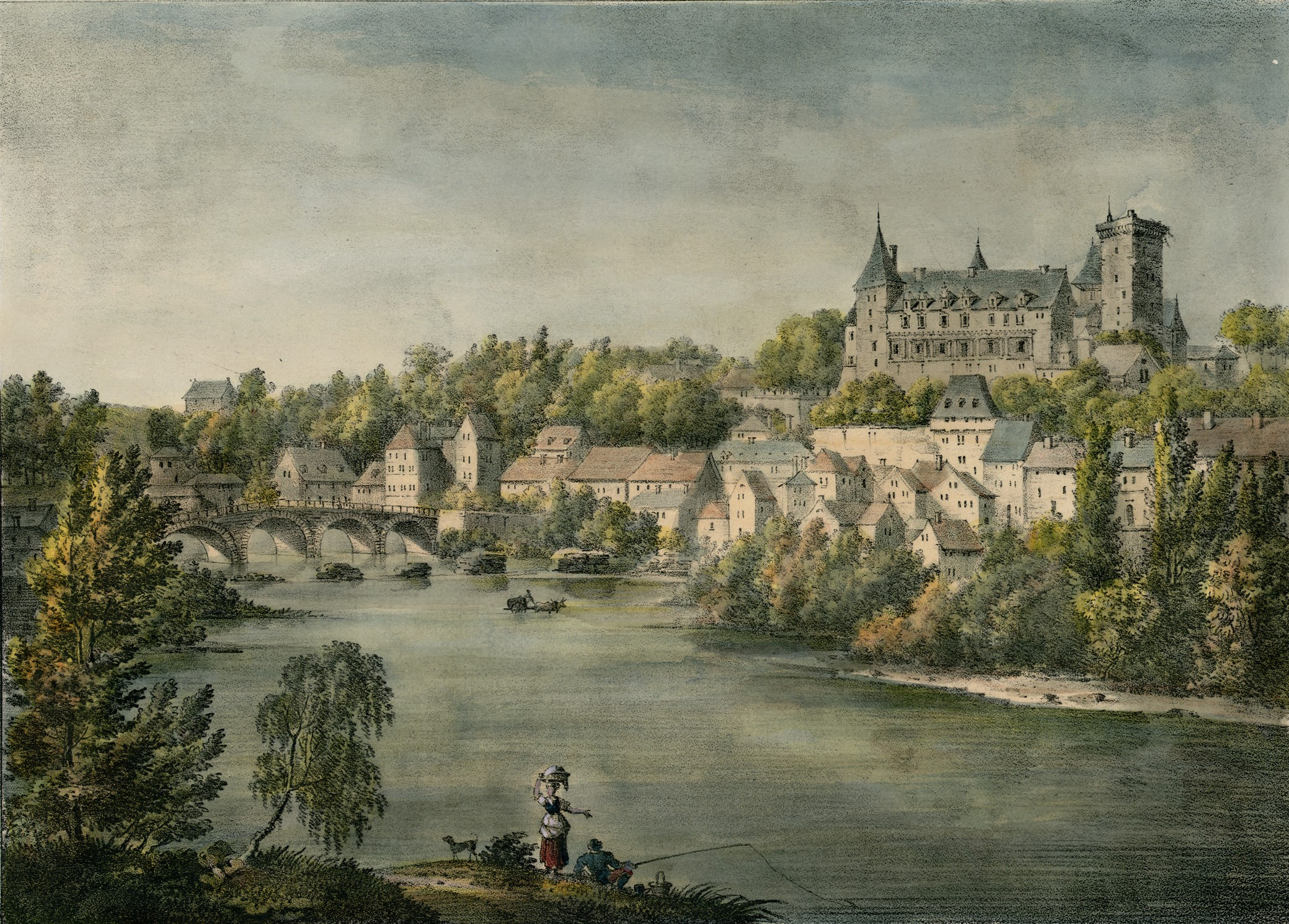 27 planches pyrénéennes extraites de "Journal of a tour in France, Switzerland, and Italy, during the years 1819, 1820, 1821", qui comprend 2 volumes in-8° et 1 album in-f° de 50 planches lithographiées. La partie pyrénéenne de l'ouvrage est contenue dans les chapitres XX, XXI et XXII du Tome II (p. 155-231) et les planches n°24 à 50 de l'album (toutes datées de 1821). La 49e lithographie (Arreau taken from the Road to Saracolin, October 1821) n'est pas chiffrée. Toutes les lithographies sont ici aquarellées Ancely, René (1876 - 1966). Possesseur